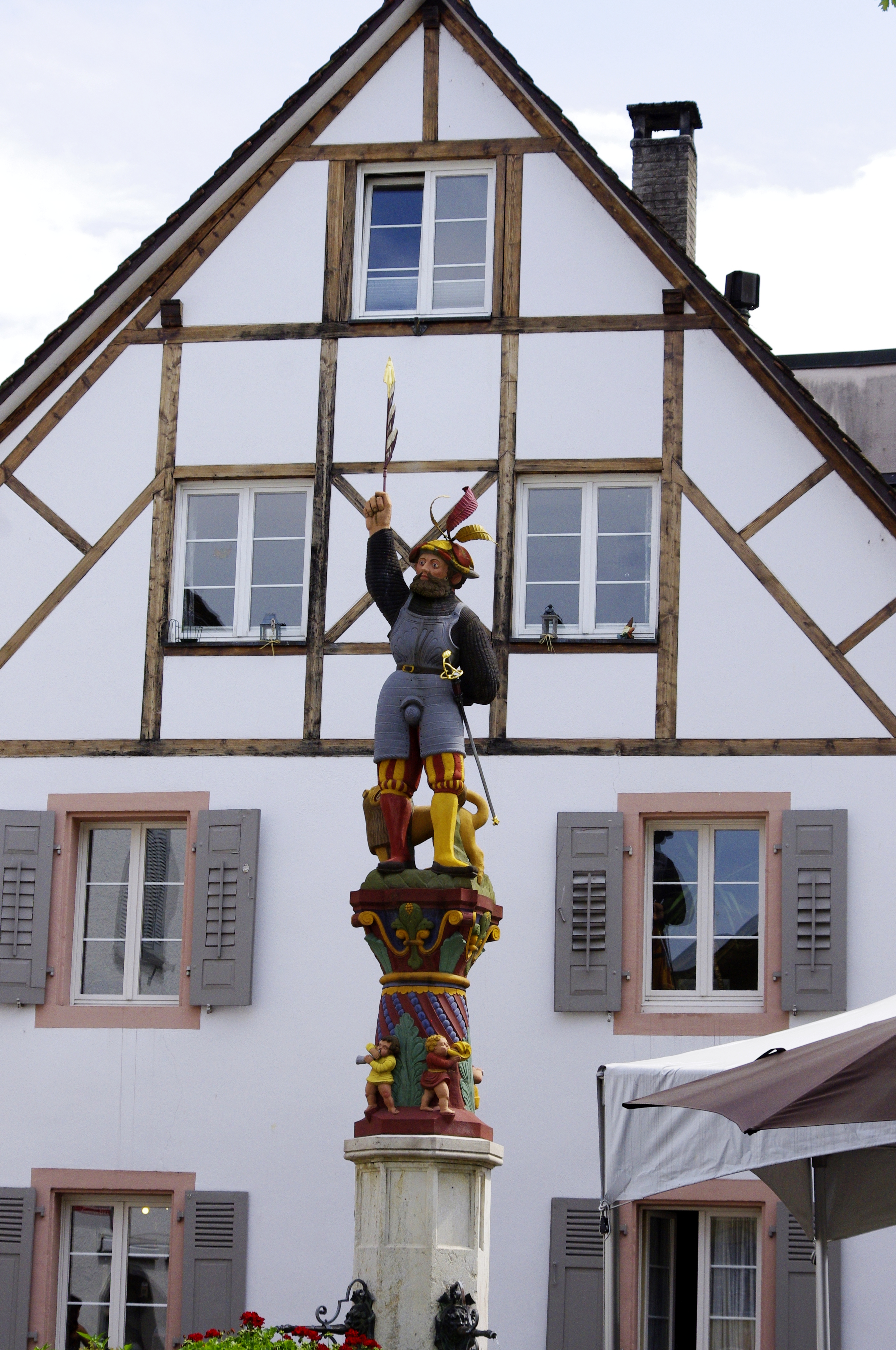 Albrechtsbrunnen, Rheinfelden im Aargau, Schweiz